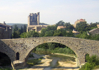 Lagrasse